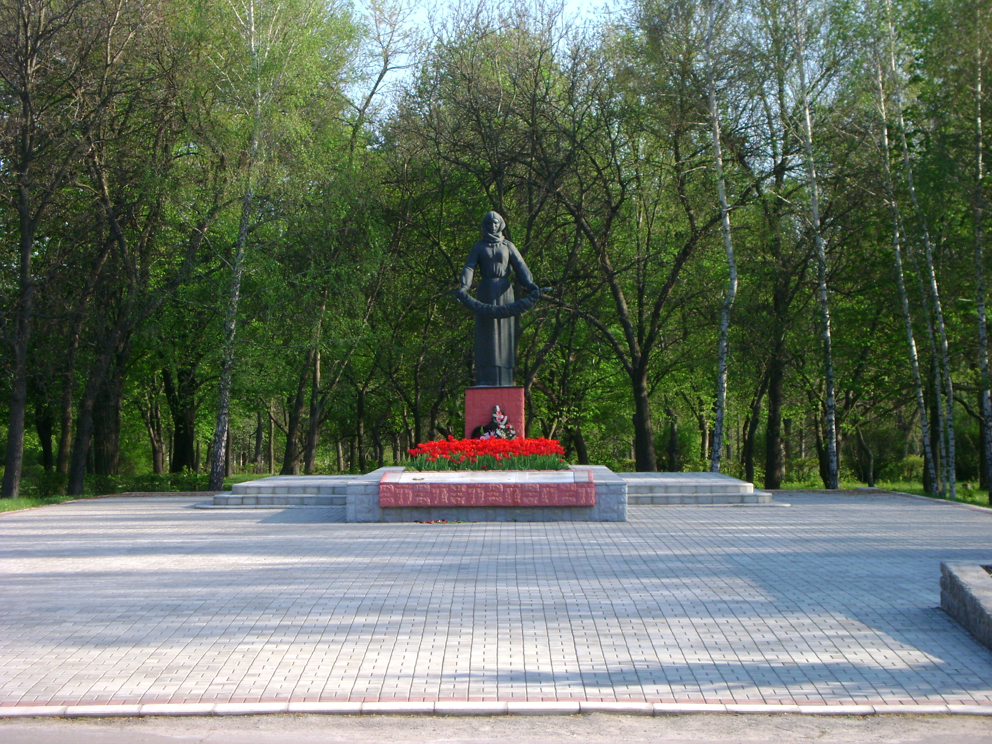 Сквер «Пам'ять», Звенигородський район, м. Ватутіне